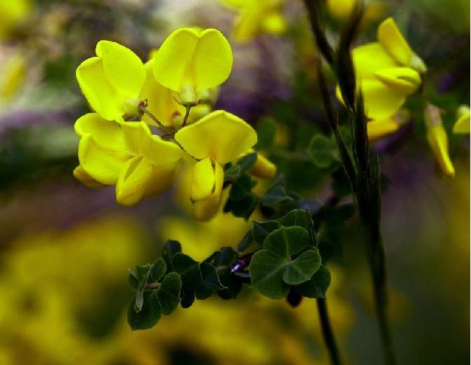 Cytisophyllum sessilifolium (syn. Cytisus sessilifolius). Cytise à feuilles sessiles photo Liondelyon, Castellane, mai 2004